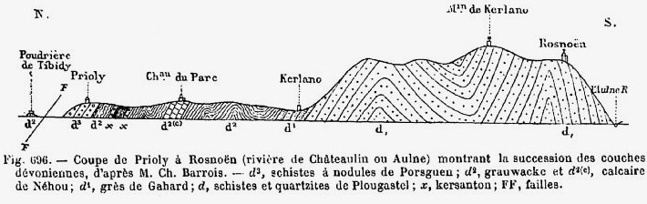 Coupe géologique de Rosnoën (Finistère)